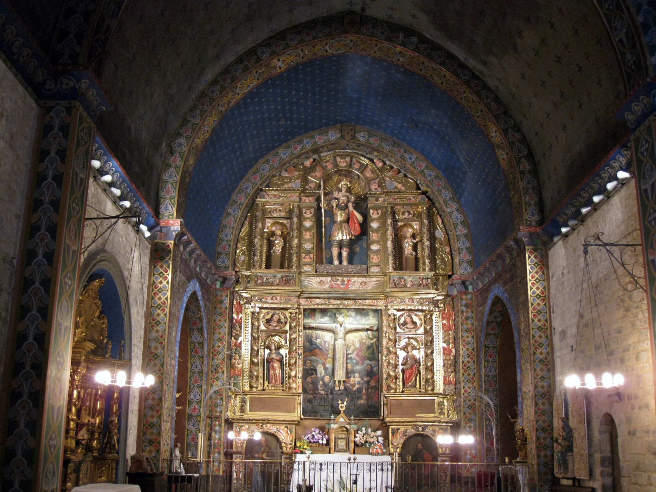 Església de Sant Cristòfol de Beget (Camprodon)